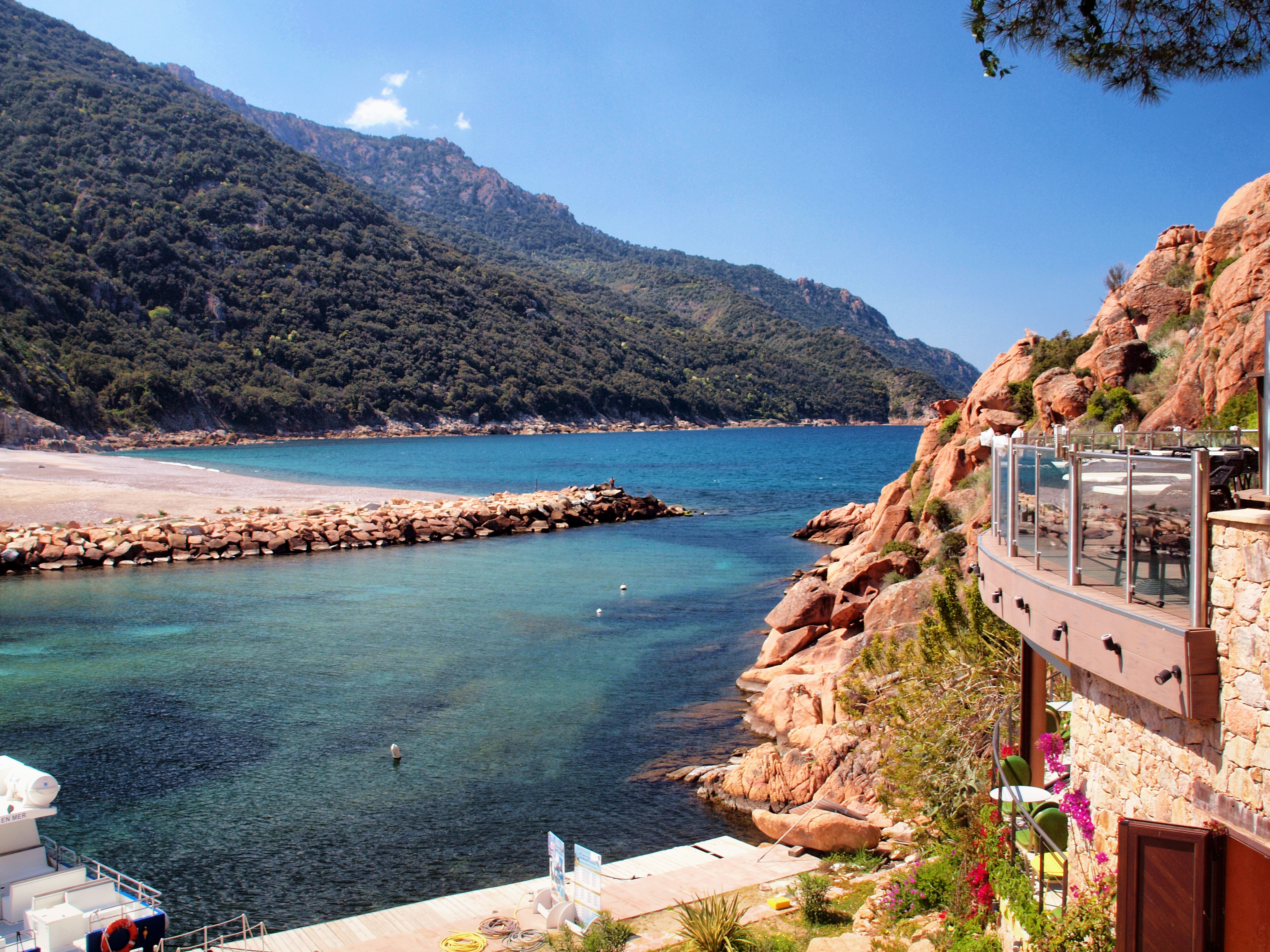 Ota, Centre Corse - Embouchure du Porto, au sud de la tour génoise de Porto